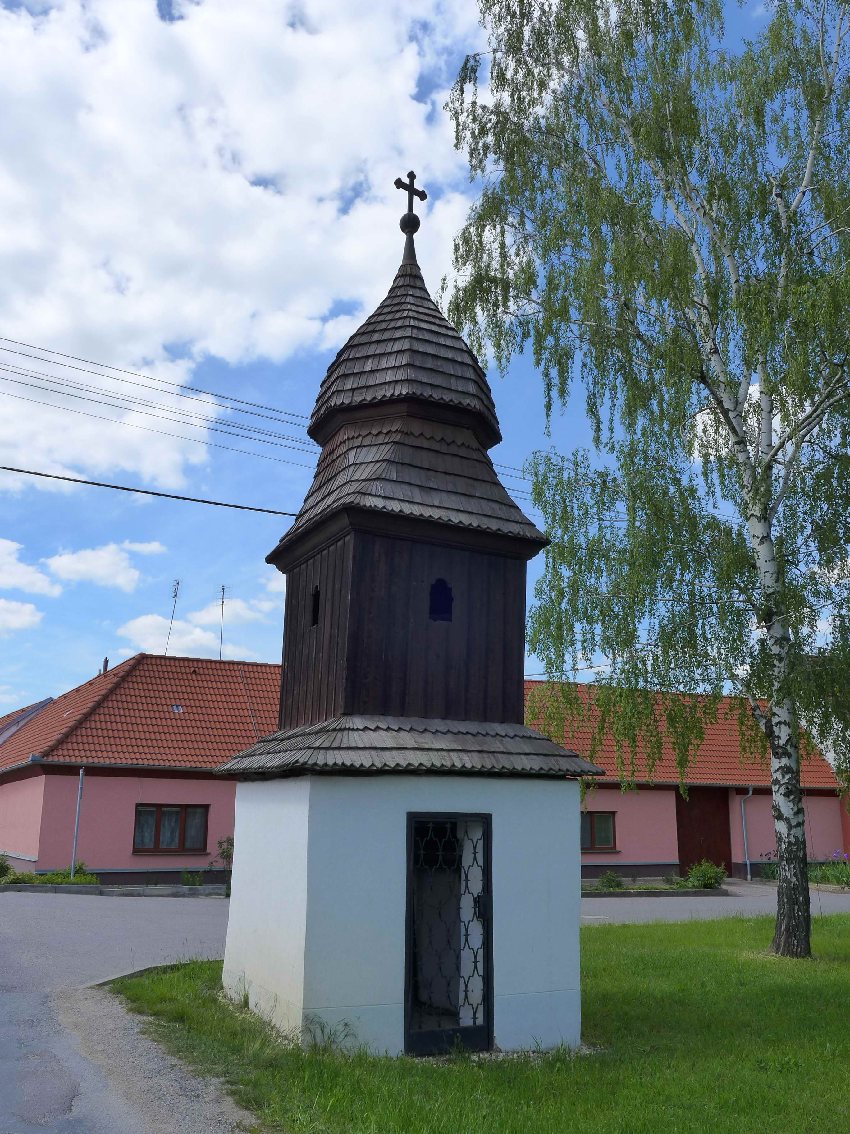 Zvonice, náves, Chlupice.